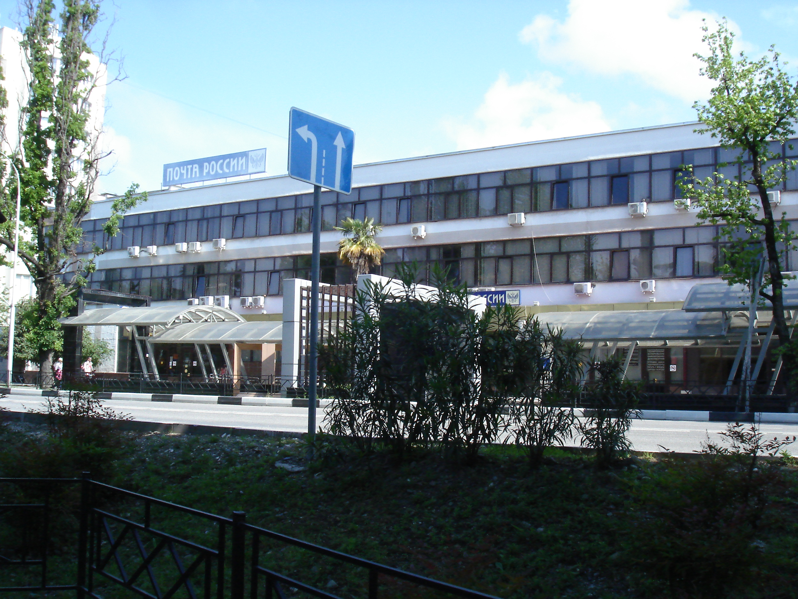 Почта России в Адлере